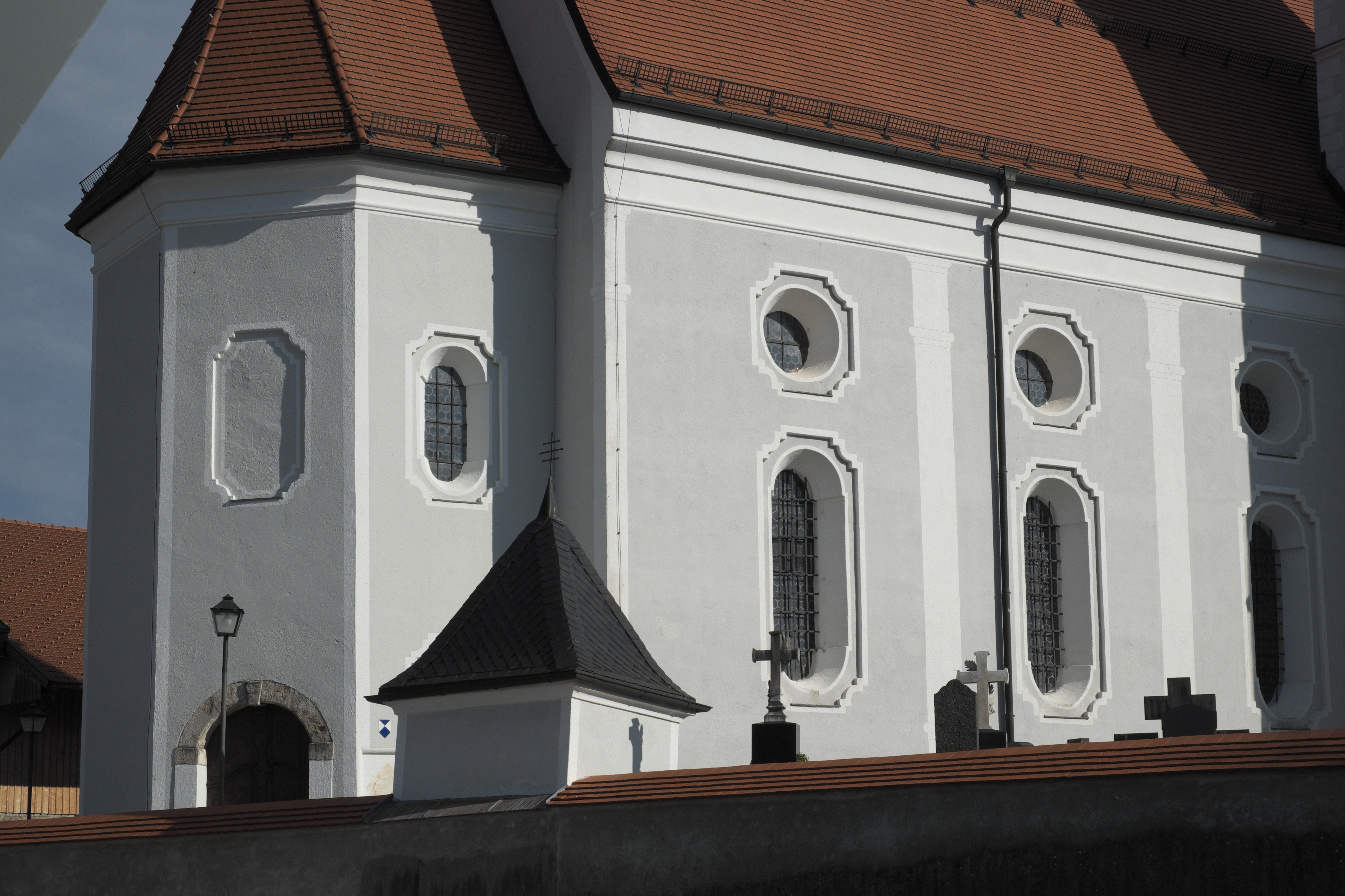 Katholische Pfarrkirche St. Emmeram in Kleinhelfendorf (Aying) im Landkreis München (Bayern/Deutschland)